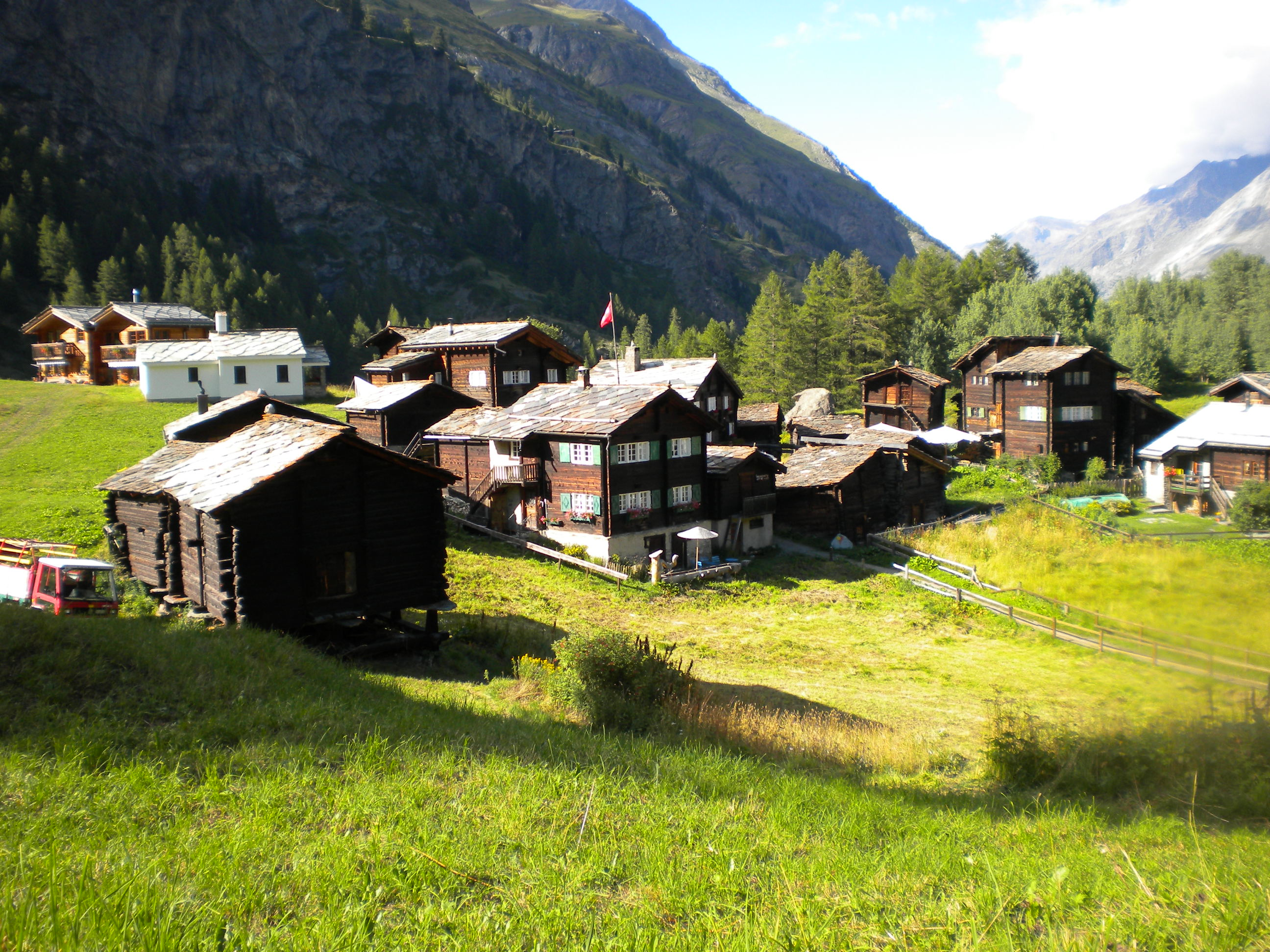 Zum See, Weiler bei Zermatt